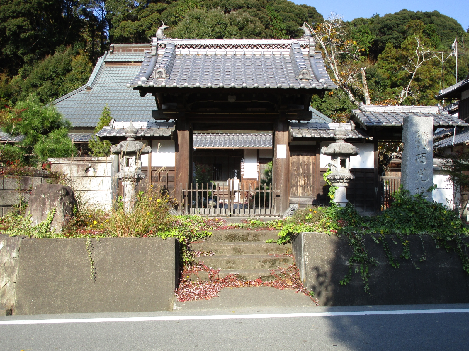 萬勝寺西光院